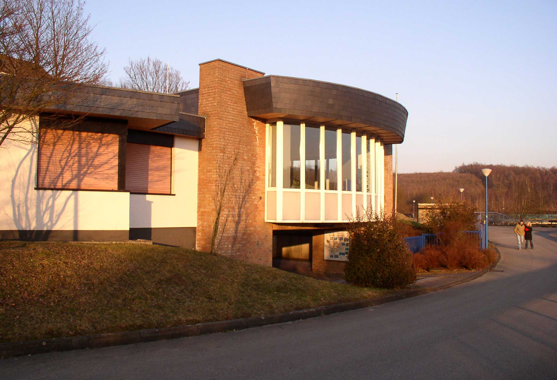 Infozentrum an der Staumauer, 2005 selbst fotografiert